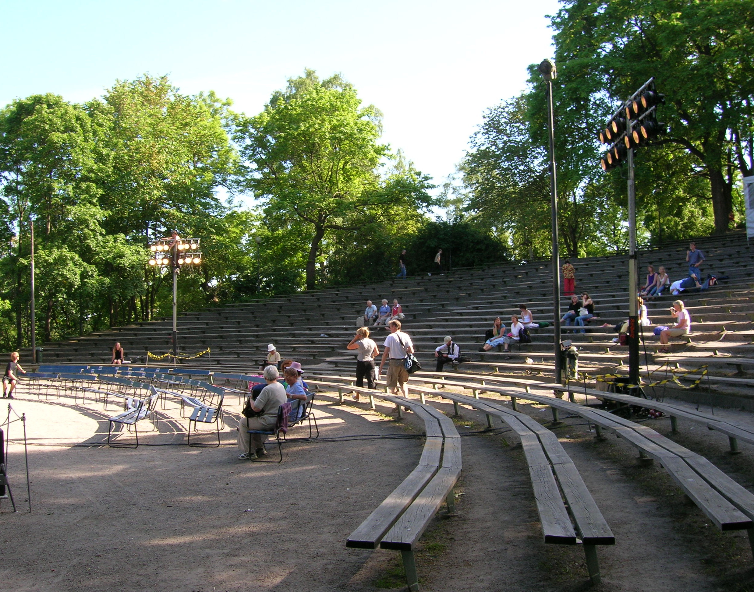 Scenen i Vitabergsparken, Södermalm, Stockholm, 11 juni 2006 Fotograf: Niklas Nordblad